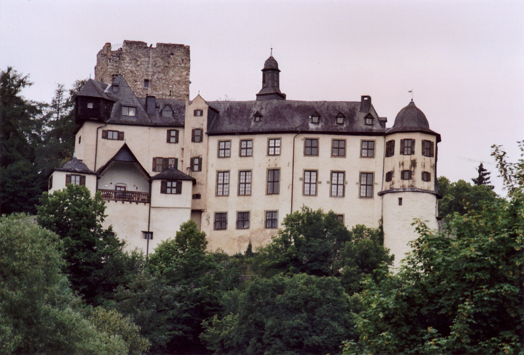 Nordostseite der Burg Hohlenfels